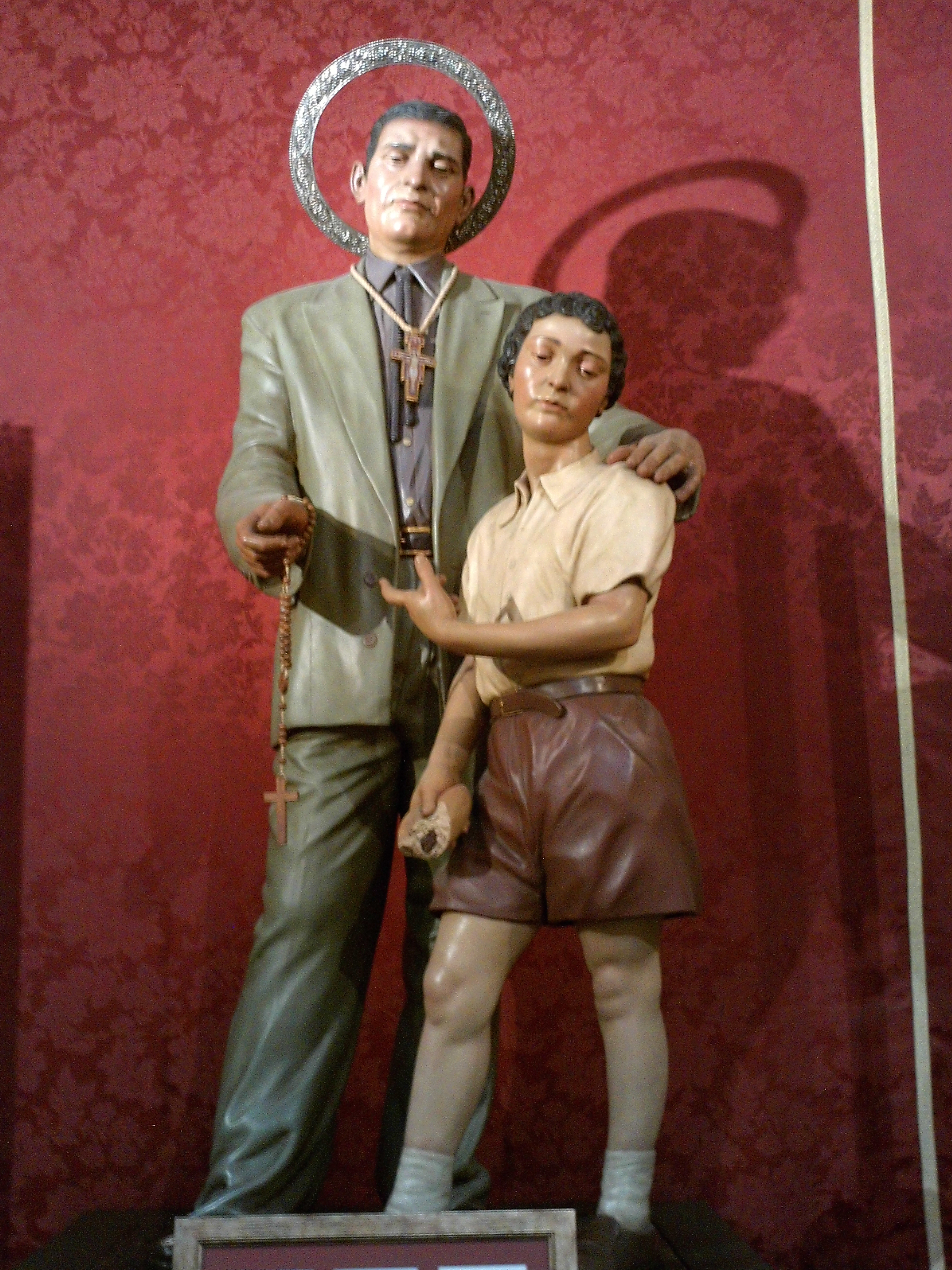 Estatua del Beato Ceferino Giménez Malla, "el Pelé" (Darío Fernández Parra, 2001). Santuario de los Gitanos, Sevilla, Andalucía, España.